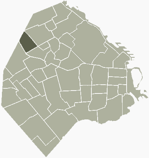 Barrio de Villa Pueyrredón